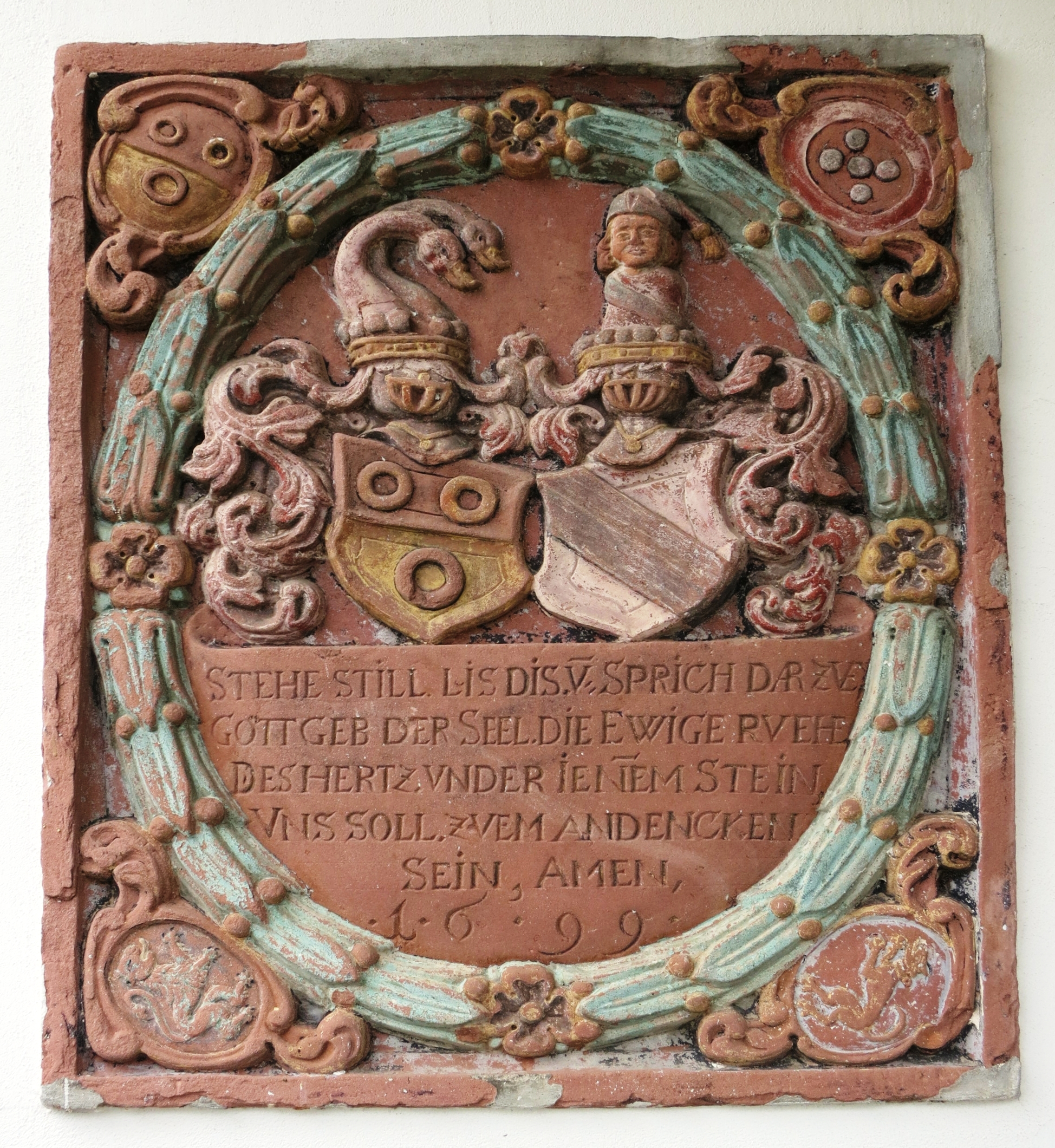 Kirche Oeschgen AG, Schweiz